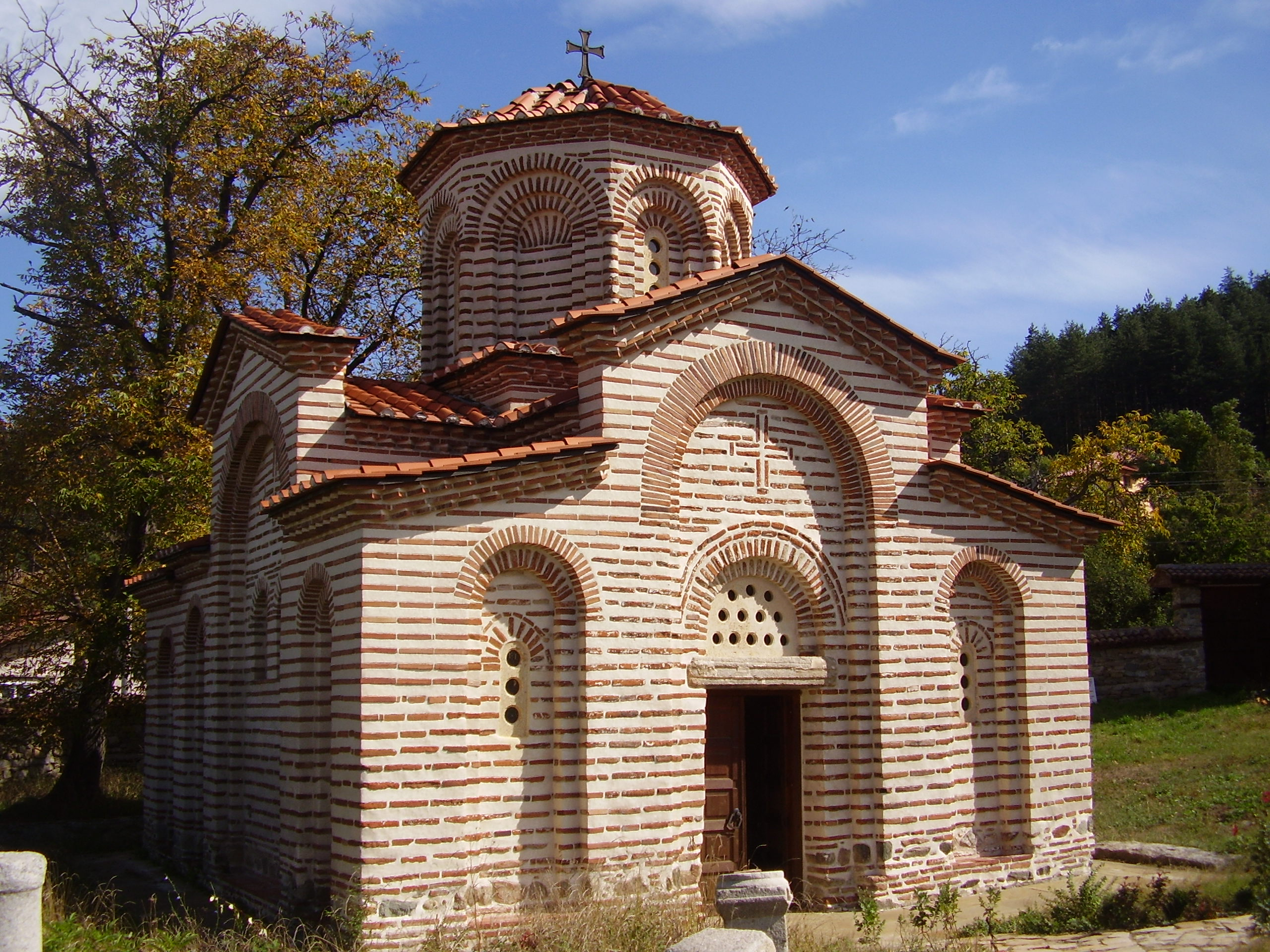 Църквата "Свети георги" - общ изглед